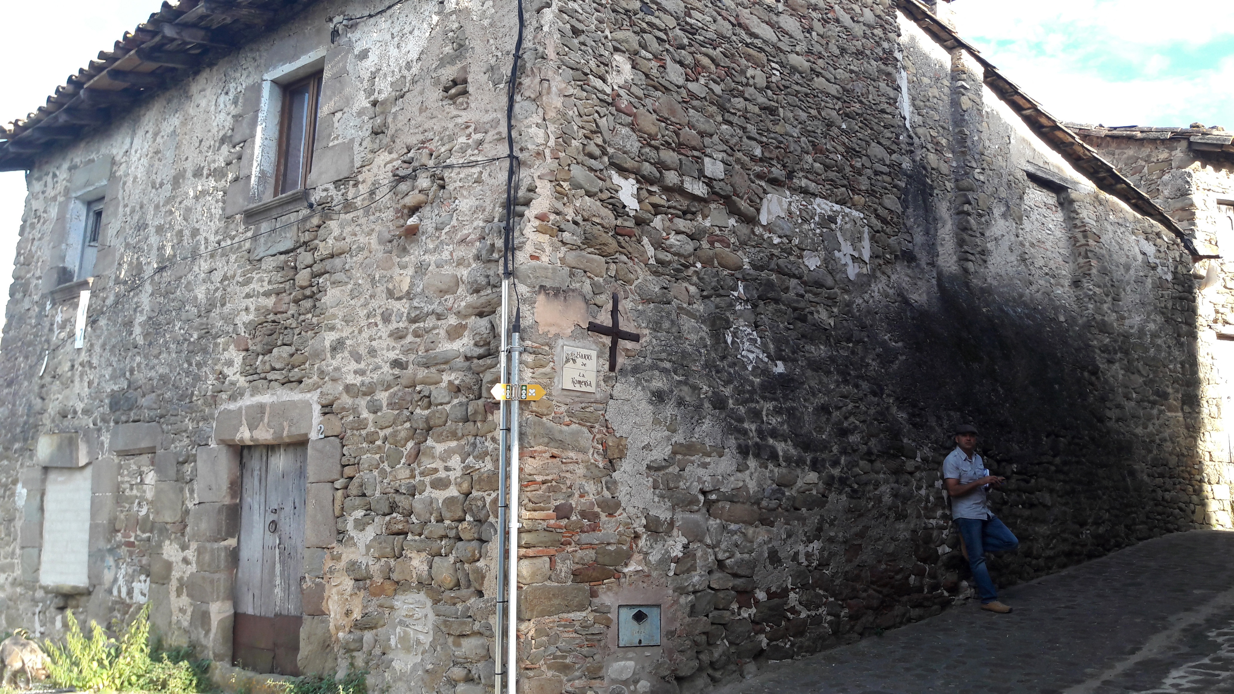 Llindes de la casa al barri de Romeria, 1 (Mieres)